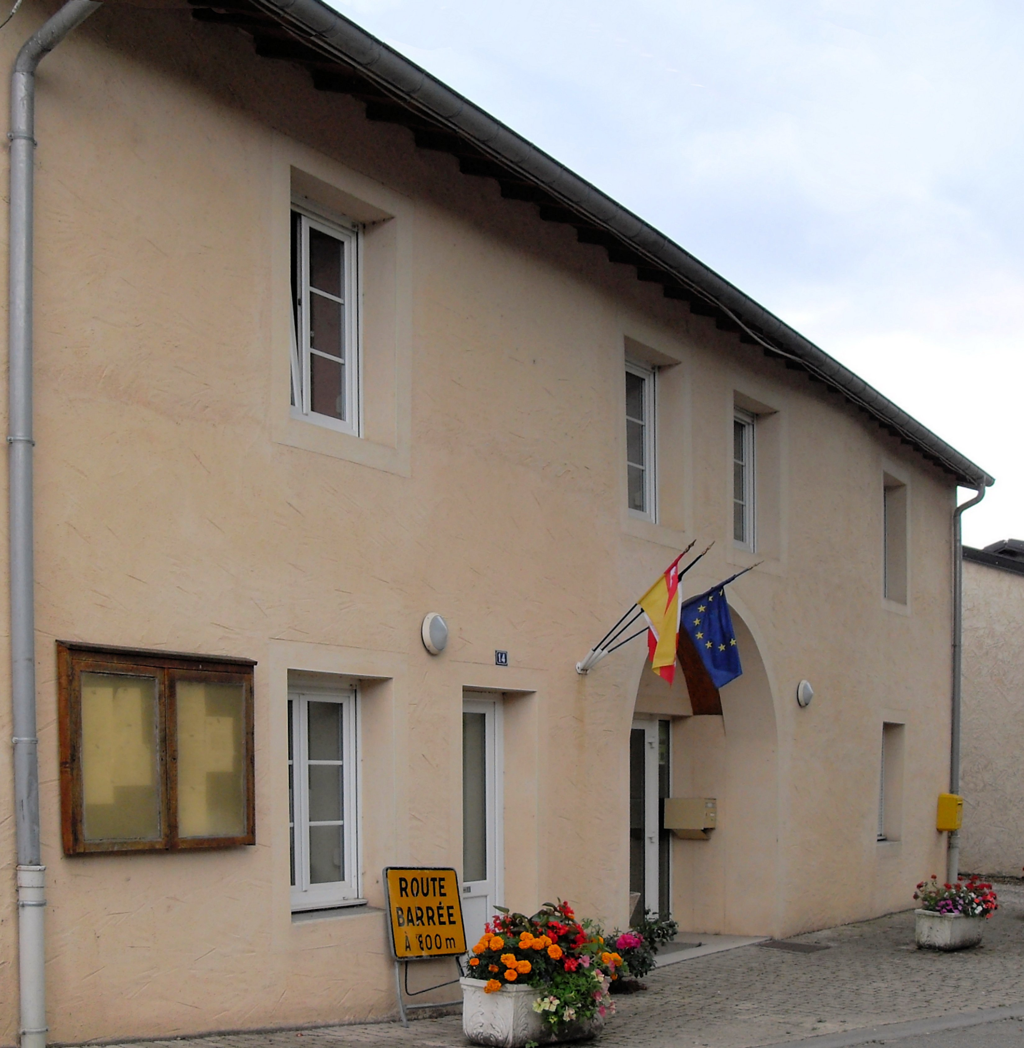 La mairie d'Avrainville